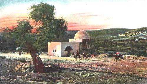 Rachel's Tomb, Bethlehem